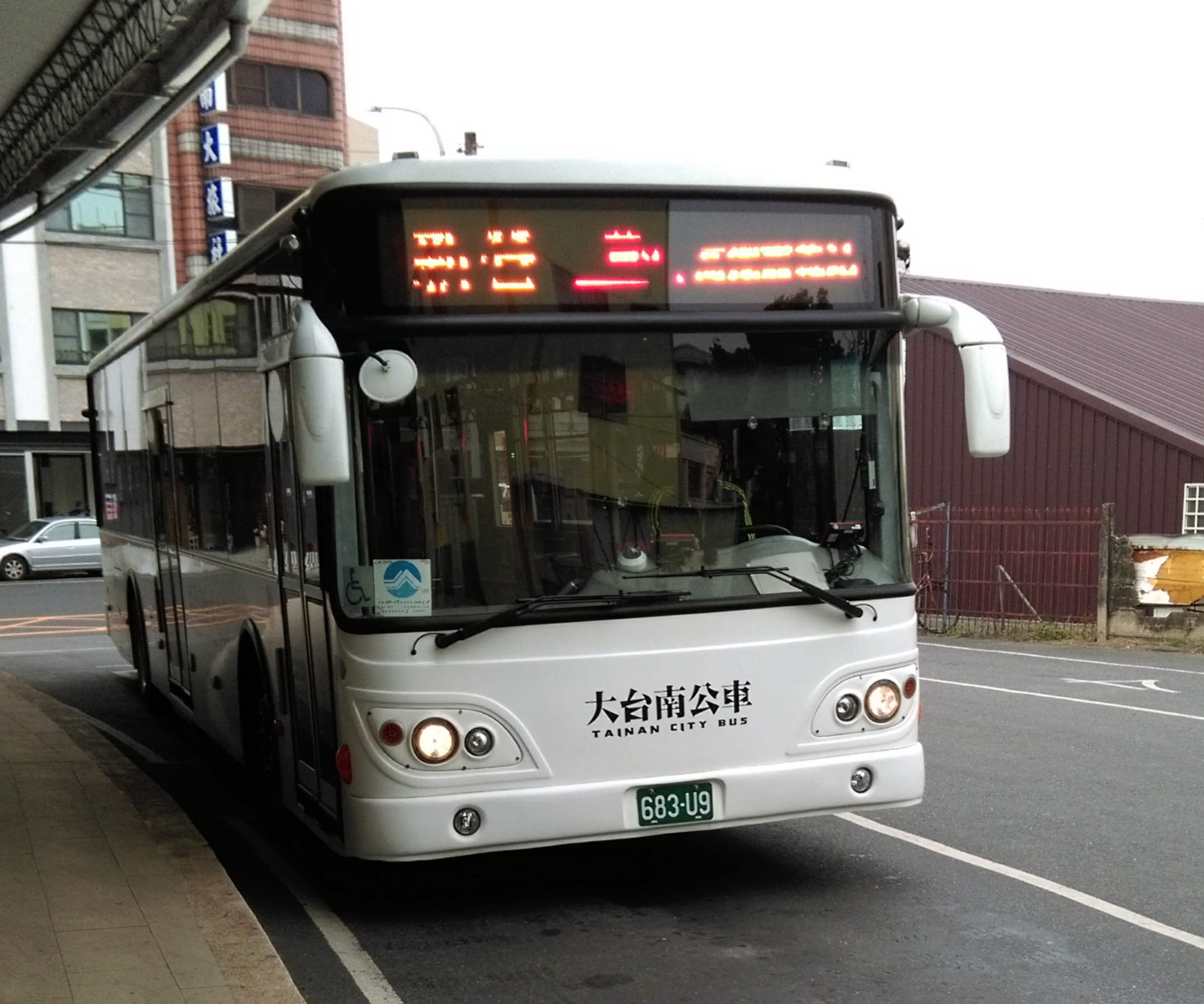 中文（台灣）: 新營客運黃9 683-U9